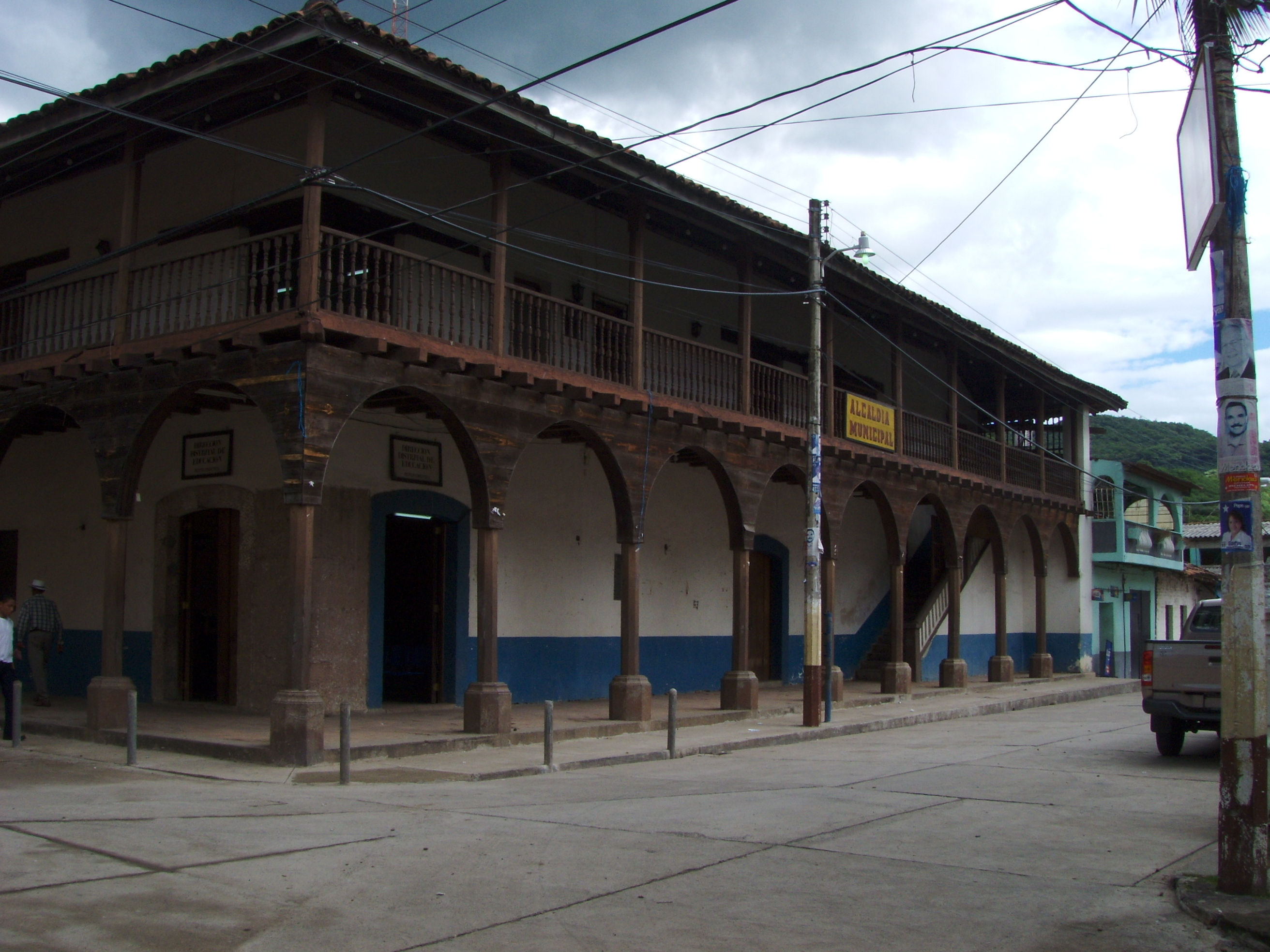 Vista del Municipio de Pespire en la ciudad del mismo nombre en el Departamento de Choluteca, en Honduras